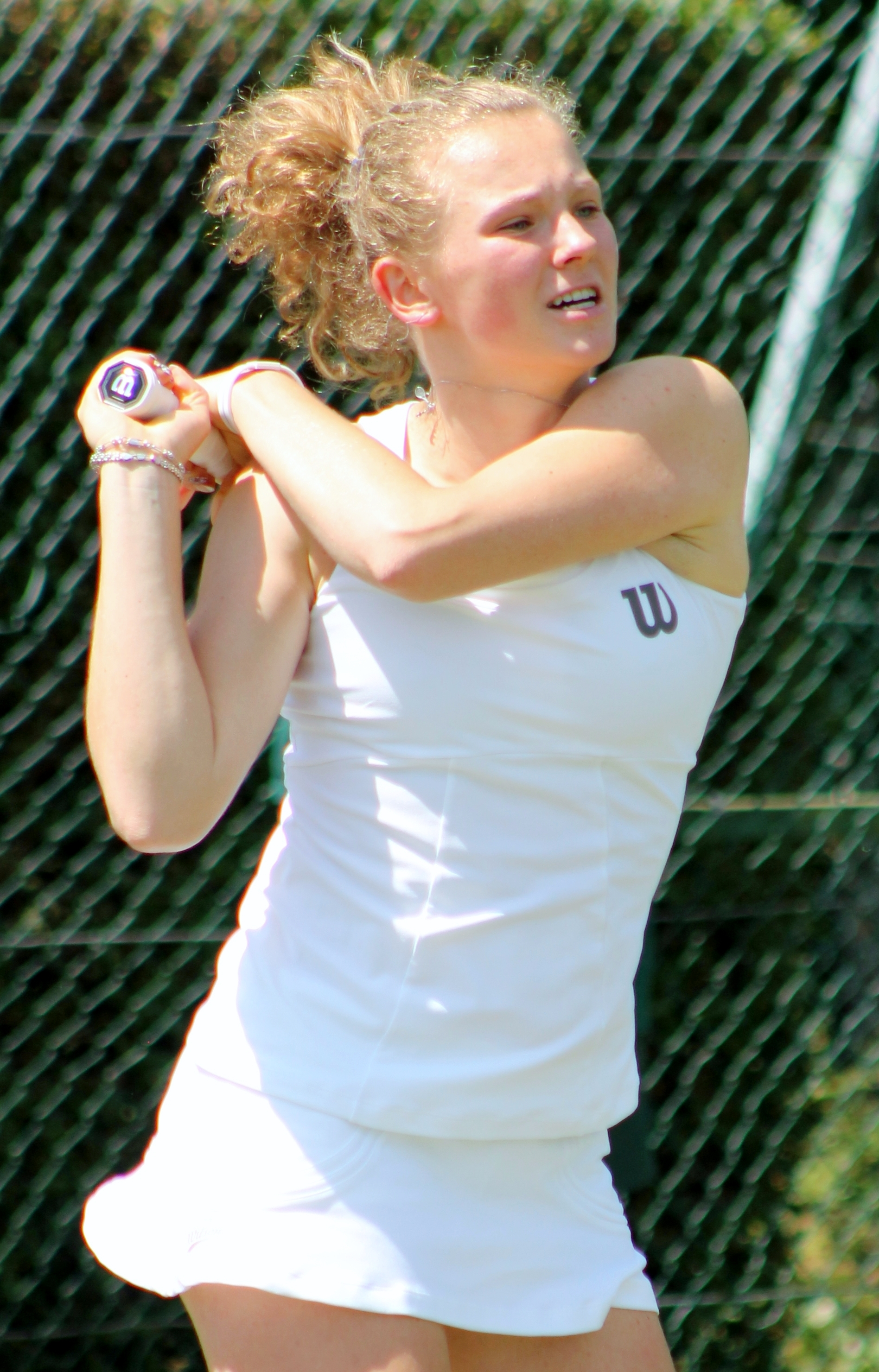 Siniakova WMQ14 (5)